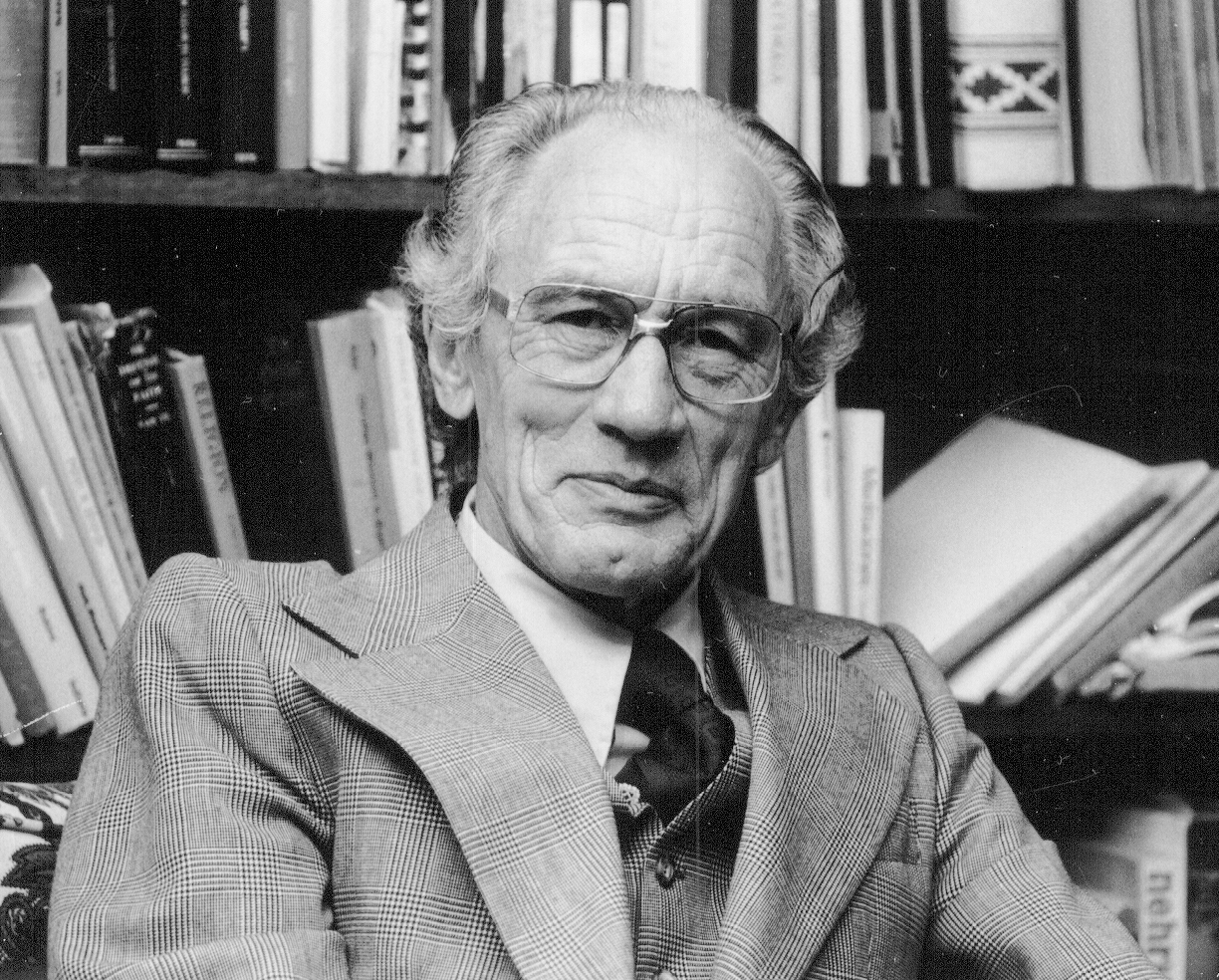 Kenneth Lee Pike was an American linguist and anthropologist. He was the originator of the theory of tagmemics and coiner of the terms "emic" and "etic".